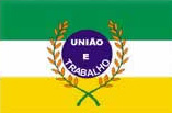 Bandeira Paraúna, Goiás, Brasil